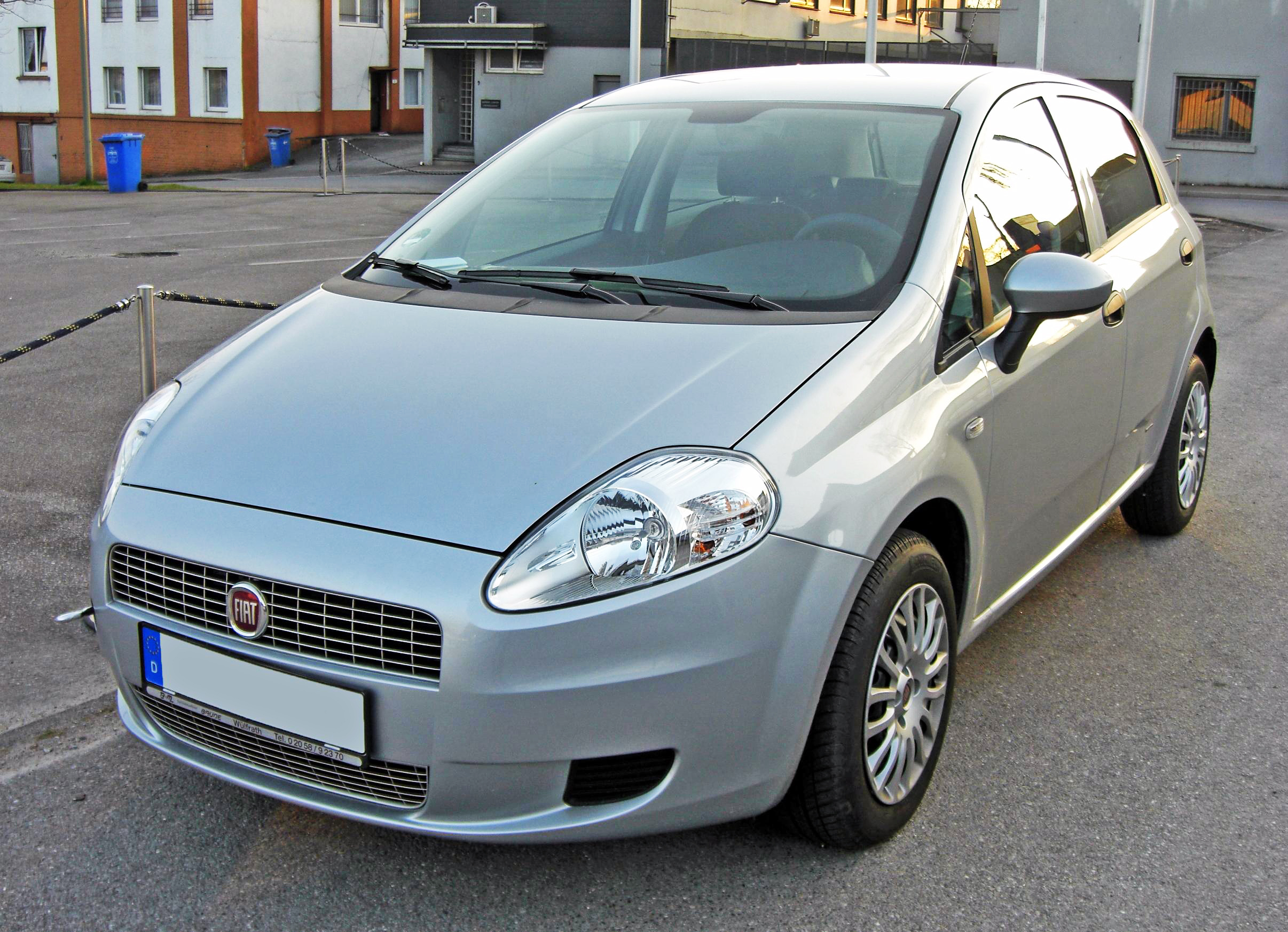 Fiat Grande Punto